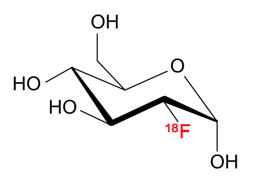 Bearbetning av /remix of file:Fludeoxyglucose 18-F skeletal.svg